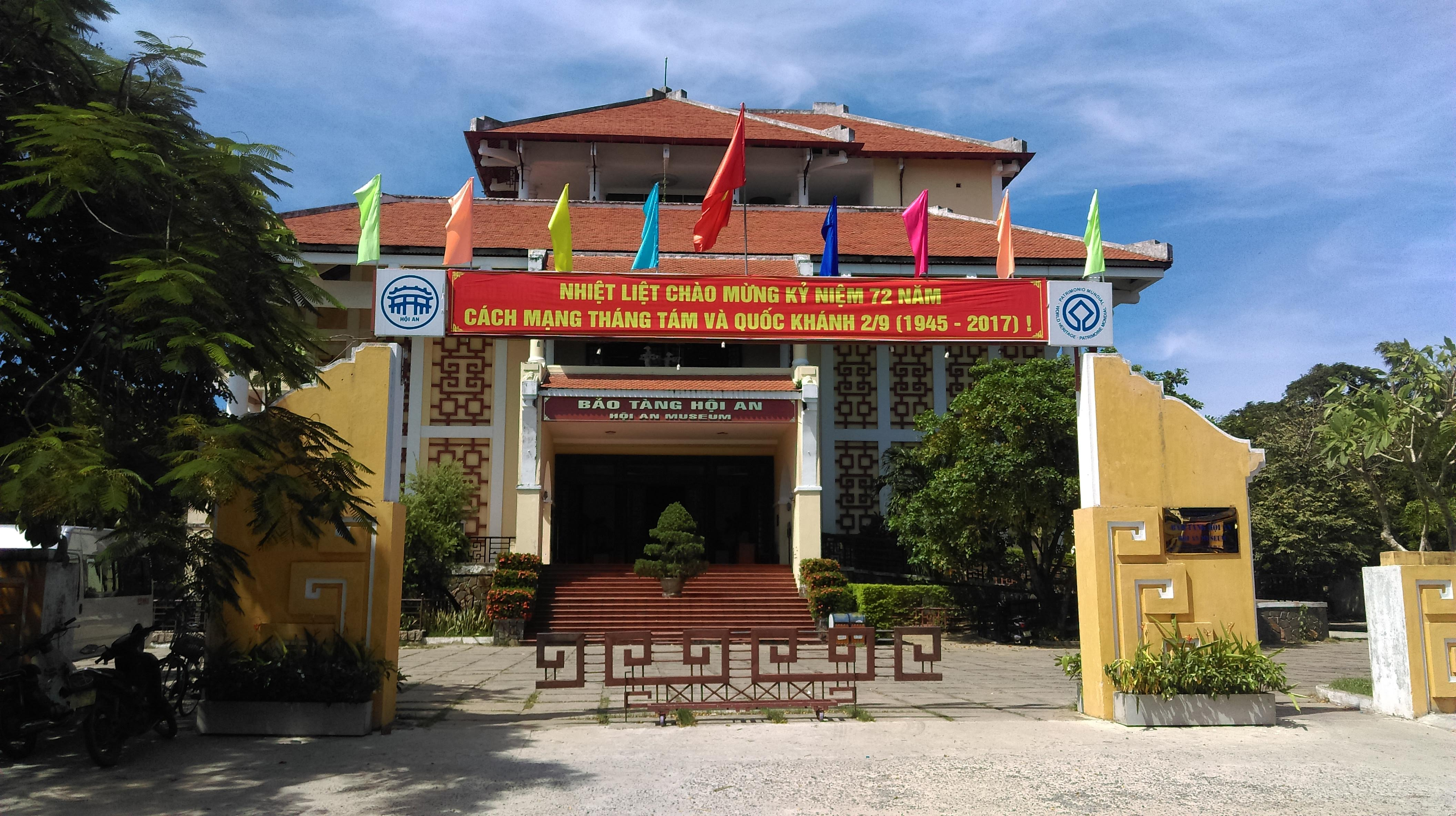 Bảo tàng Hội An, Quảng Nam